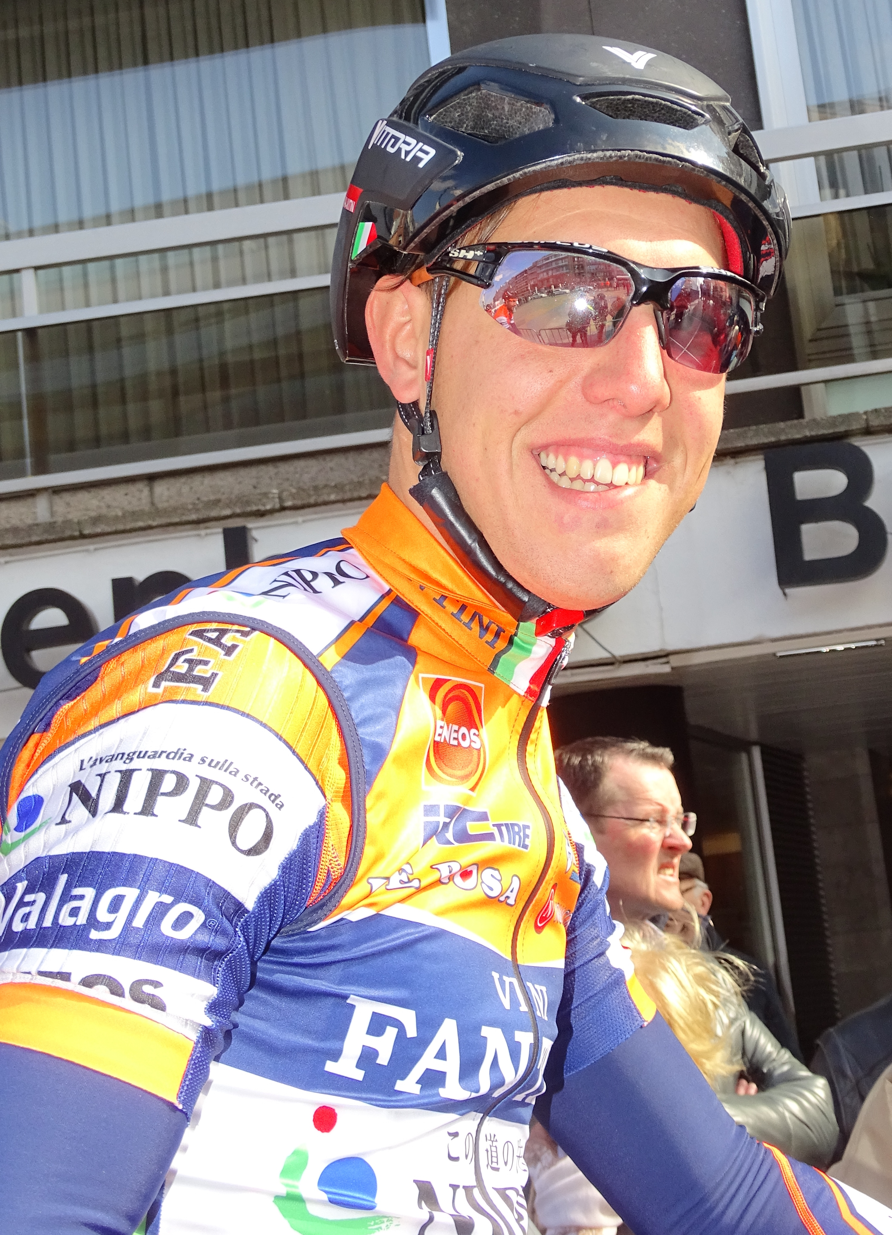 Reportage réalisé le mercredi 16 mars à l'occasion du départ de la Nokere Koerse 2016 à Deinze, Belgique.